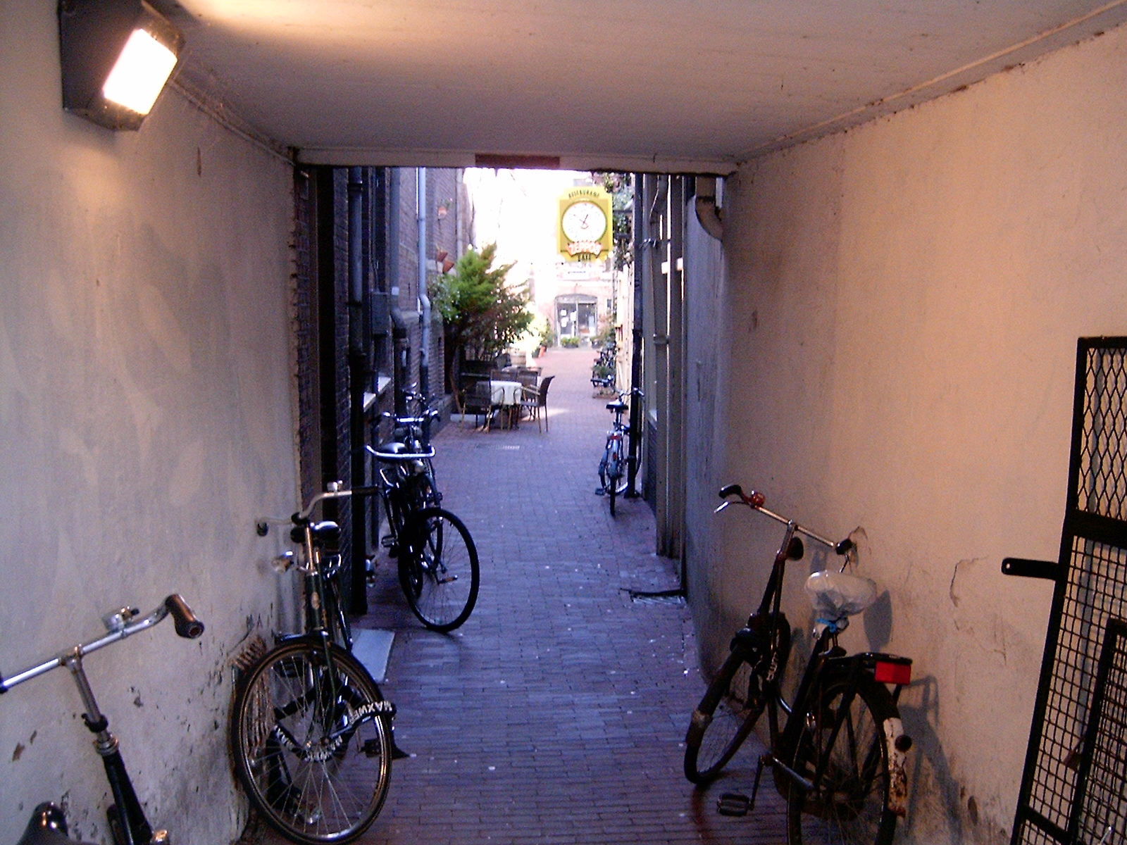 Gebed Zonder End, steegje in Amsterdam. Eigen werk.